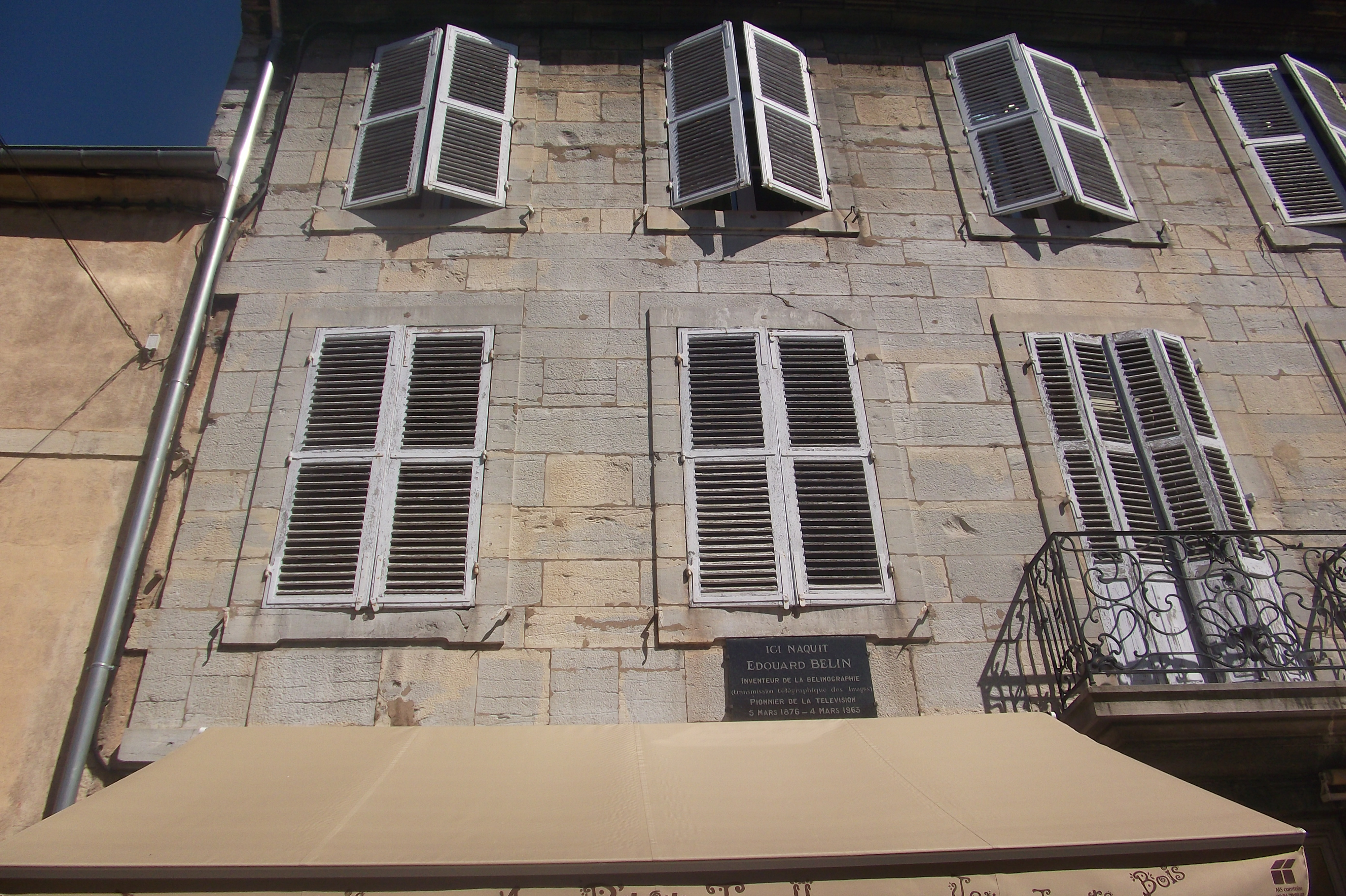 La maison natale d'Edouard Belin à Vesoul (Haute-Saône, Franche-Comté)